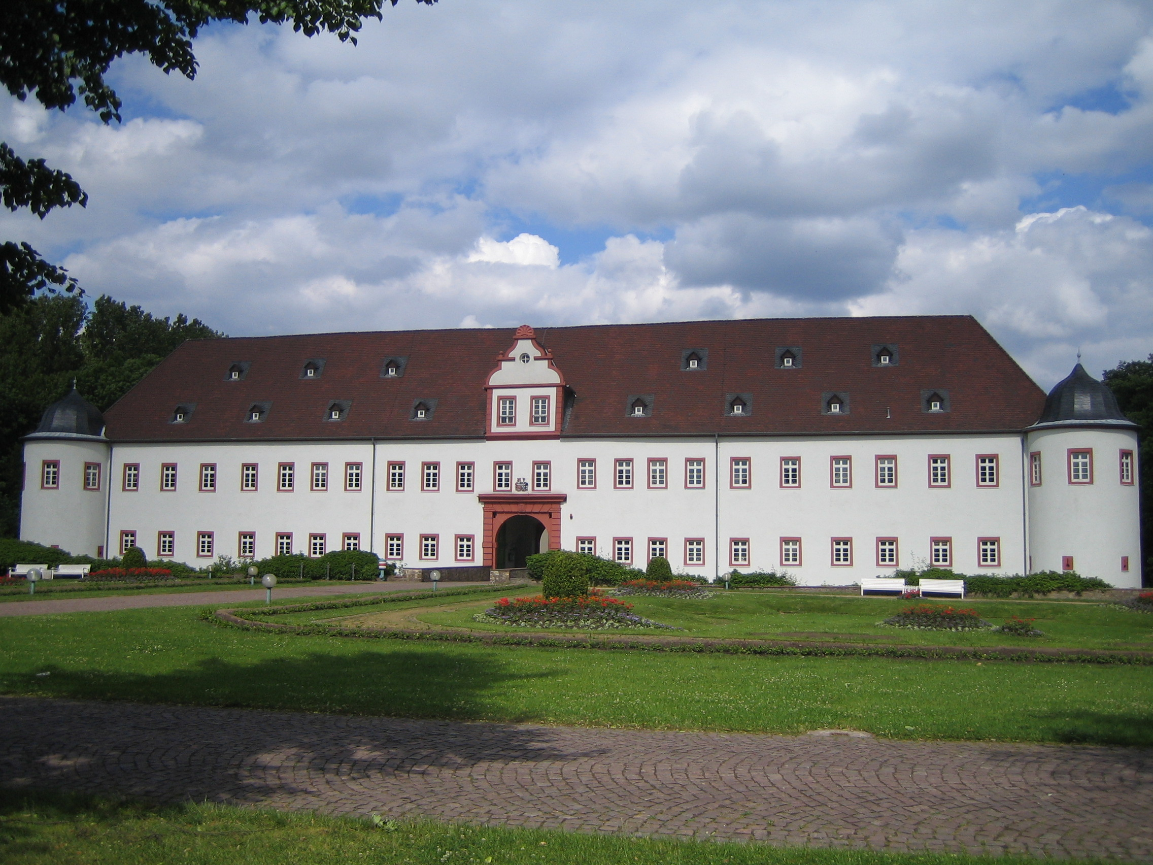 Schloss Heusenstamm in Heusenstamm, Deutschland